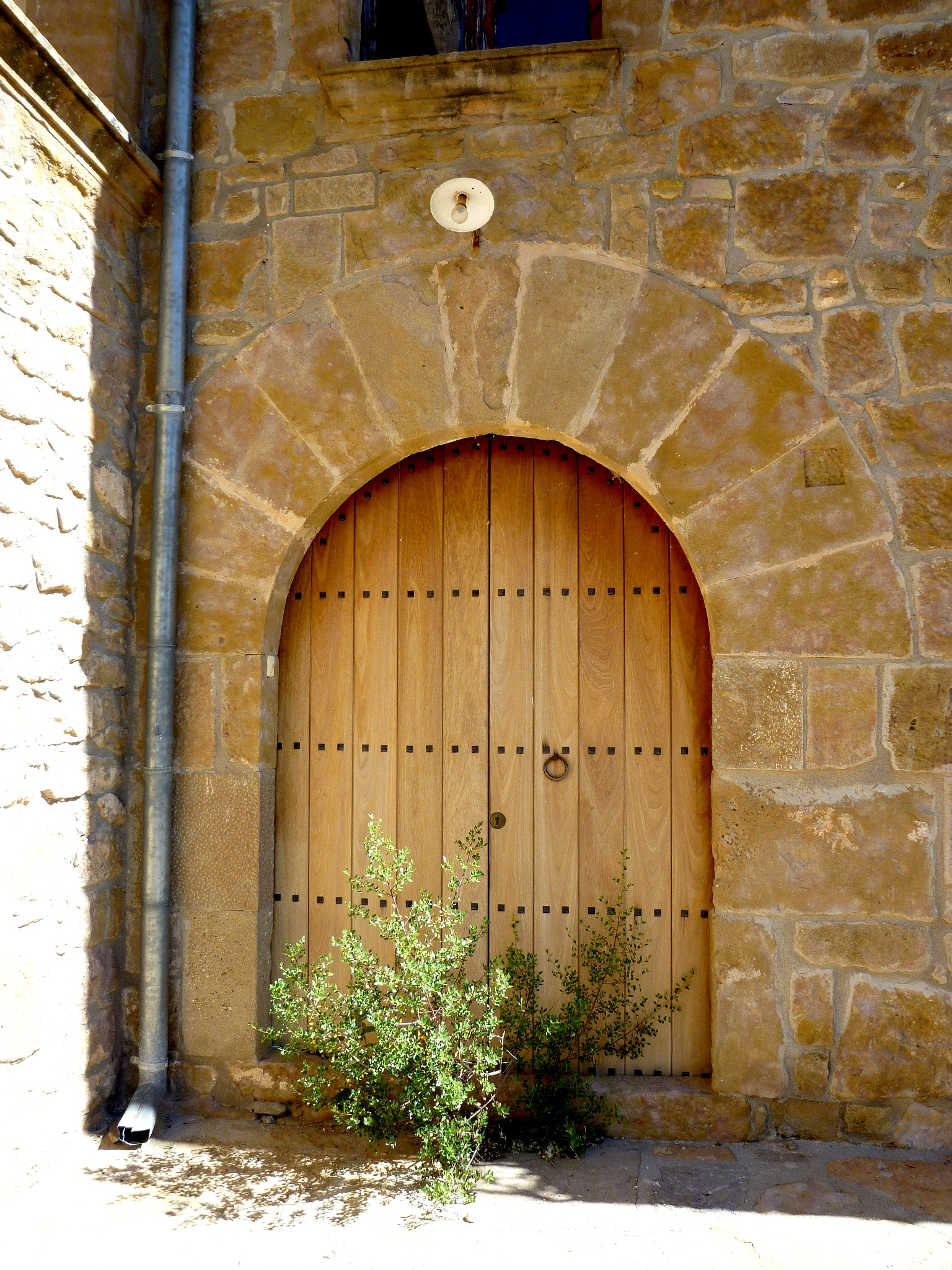 Masia Sangrà (Pinell de Solsonès): portal